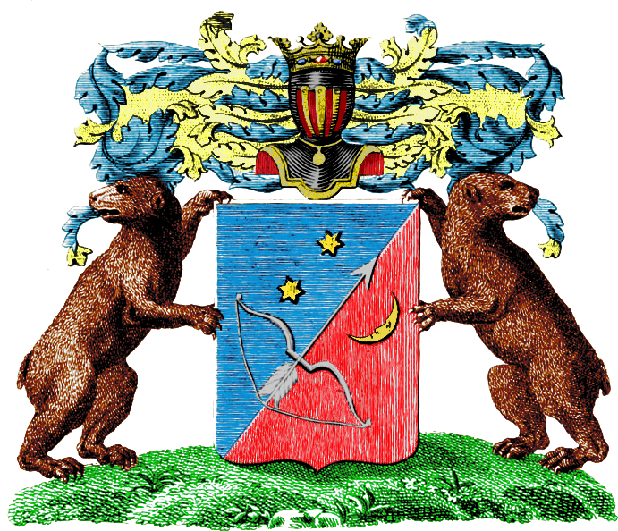 Герб рода Лихаревых потомства выехавщего в Россию Анания по прозванию Ивана Лихаря